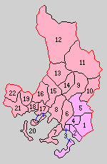 山口県都濃郡の町村制時点の町村。